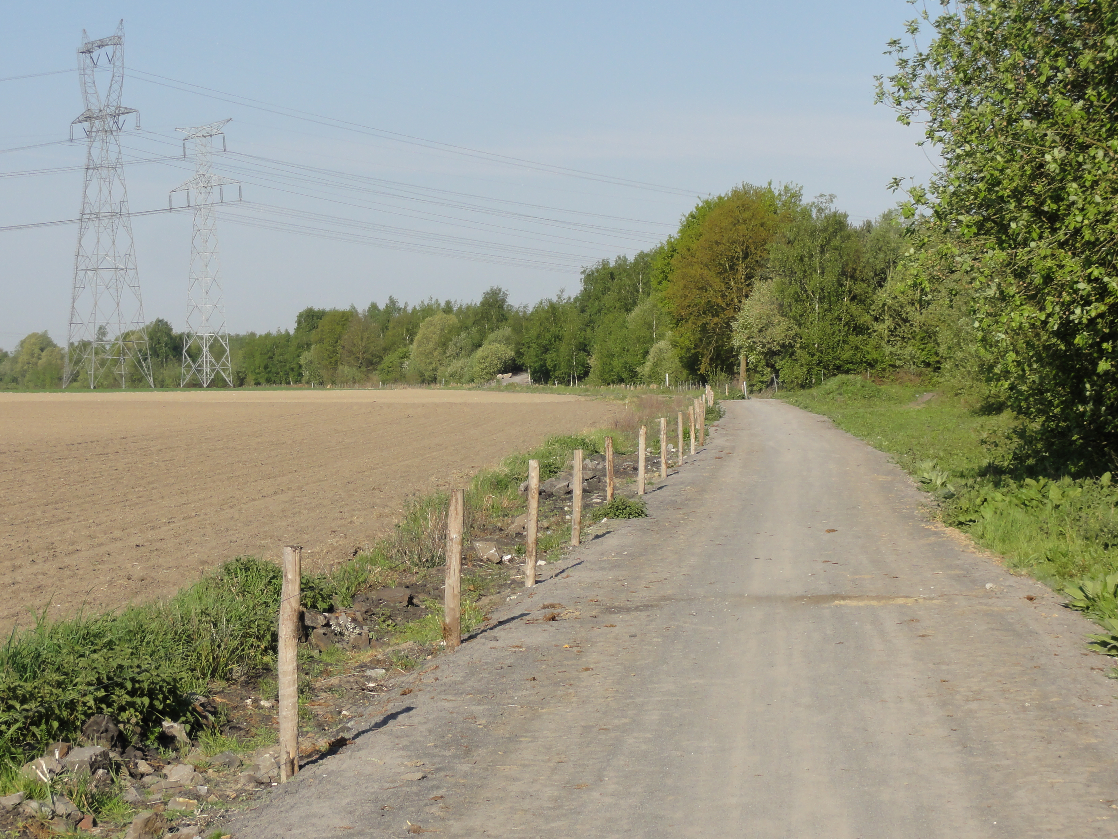 Terril n° 251 dit Cavalier du site de Rieulay, disparu, fosse De Sessevalle de la Compagnie des mines d'Aniche (principalement), Rieulay, Nord, Nord-Pas-de-Calais, France.